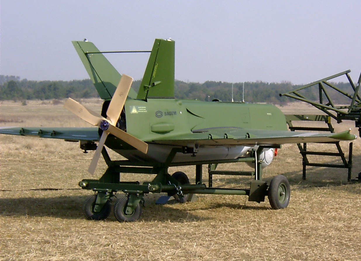 Vue arriere d'un drone SDTI